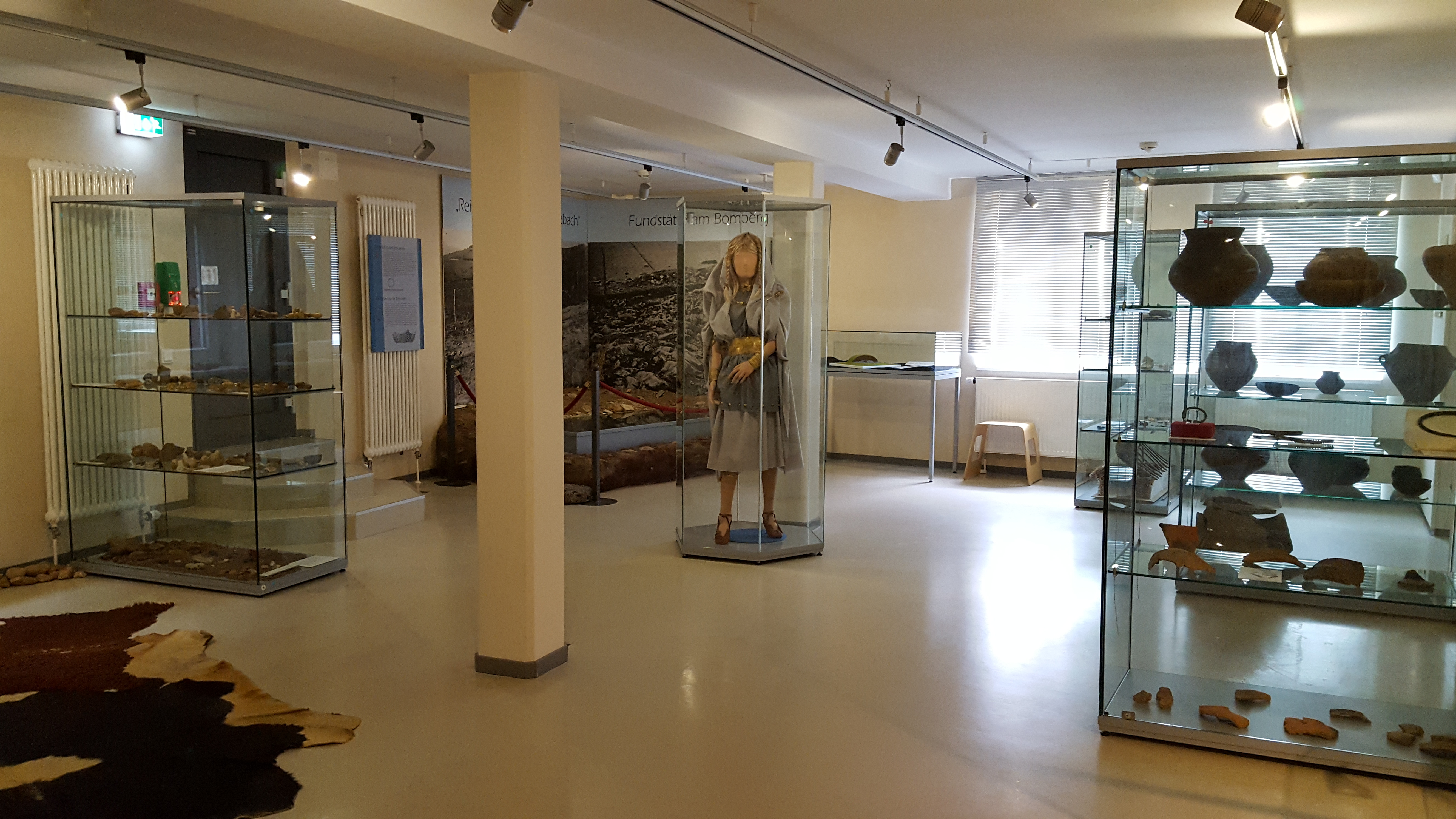 Einblick in die Abteilung "Vor- und Frühgeschichte" des Konrad-Zuse-Museum Hünfeld mit Stadt- und Kreisgeschichte